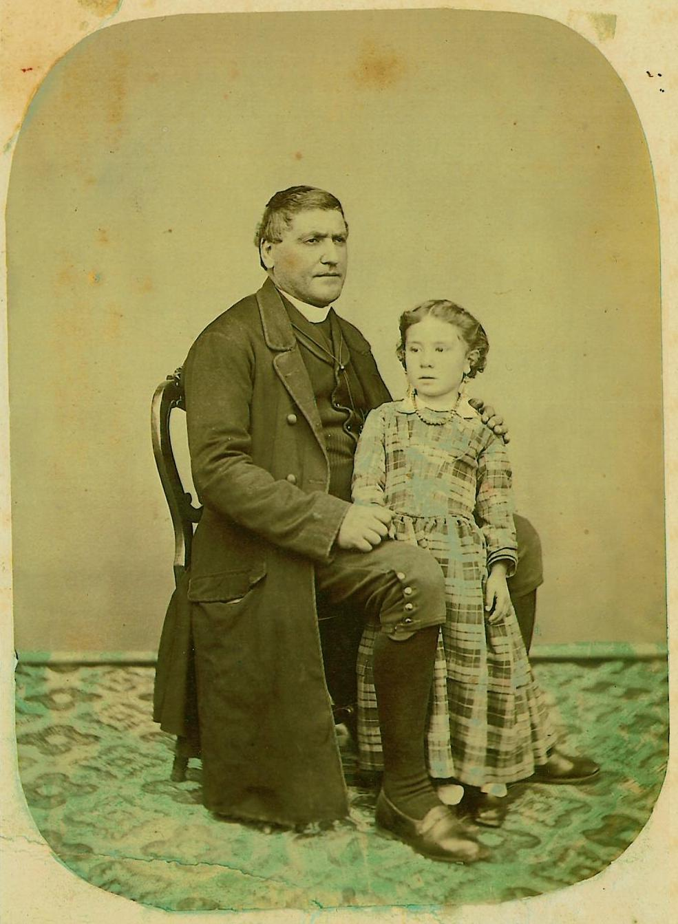 L'Arciprete Francesco Saverio dei baroni Paventi di San Bonaventura, 1823 - 1901, Vicario foraneo del cardinale Domenico Carafa della Spina dei duchi di Traetto, ultimo arcivescovo del potere temporale della Chiesa a Benevento, diretto possedimento pontificio, prima di venirne esiliato per l'annessione forzata al Regno d'Italia.